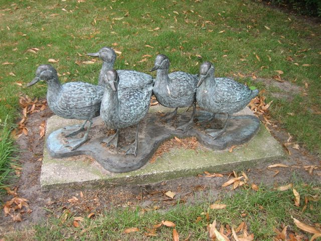 Sculpture "De Eenden" in Wanroij, The Netherlands